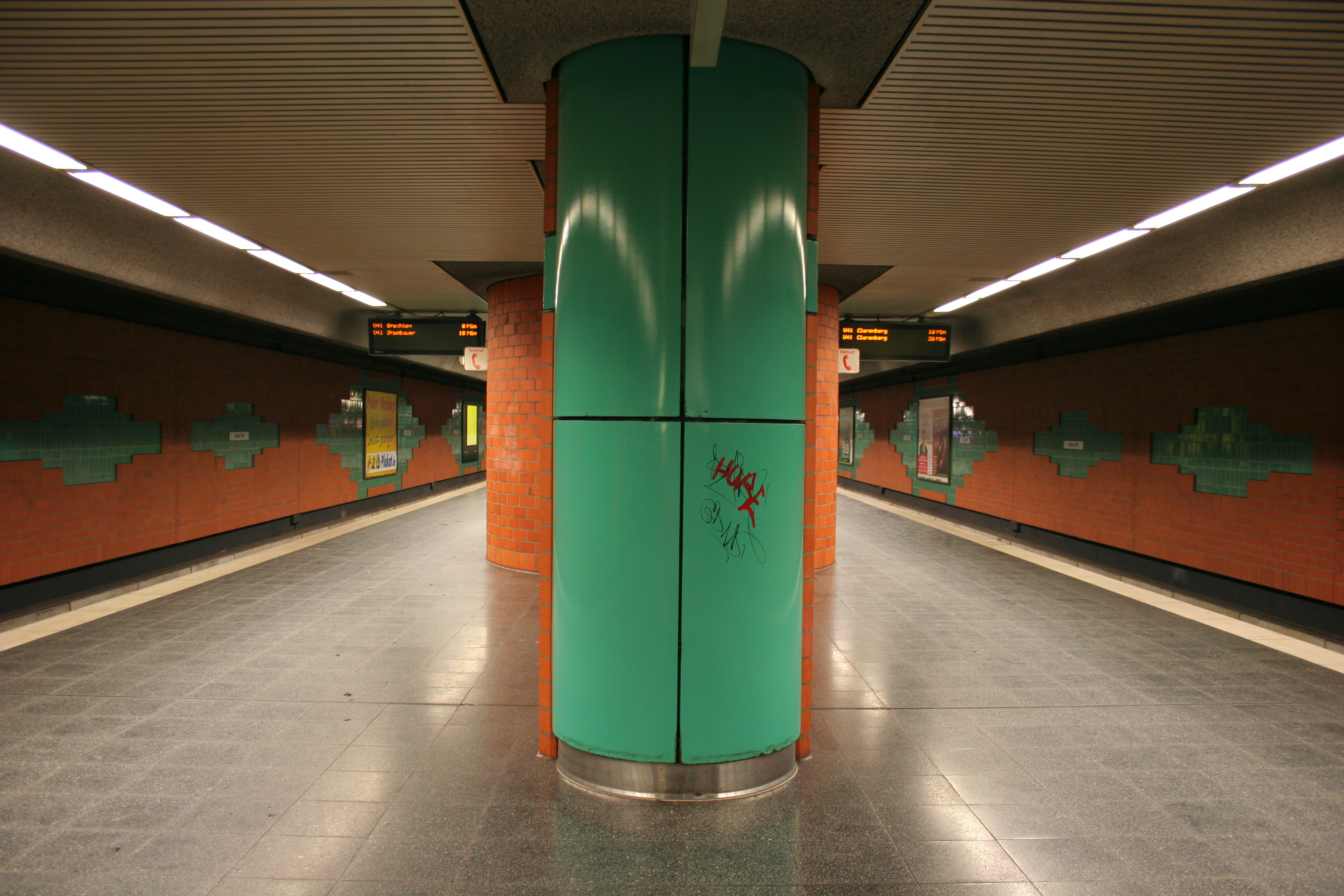 U-Bahnhof Hörde Bf der Stadtbahn Dortmund